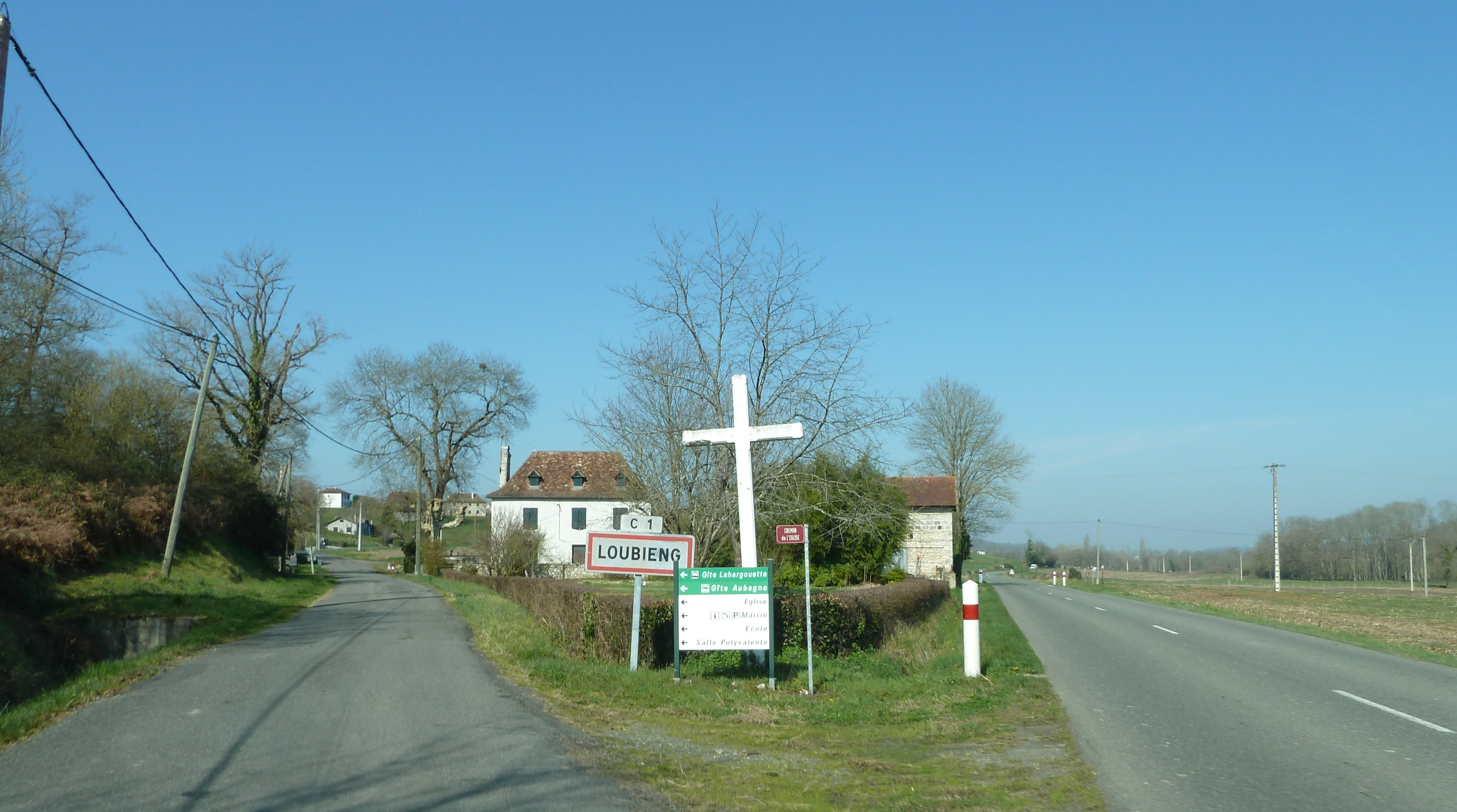 Entrée dans Loubieng